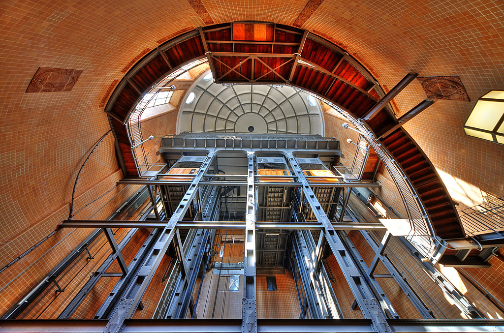 Alter Elbtunnel, Hamburg. Blick vom Grund des Alten Elbtunnels auf die Nord-Kuppel. This is the photograph of an architectural monument. It is part of the list of cultural monuments of Hamburg, no. 1399